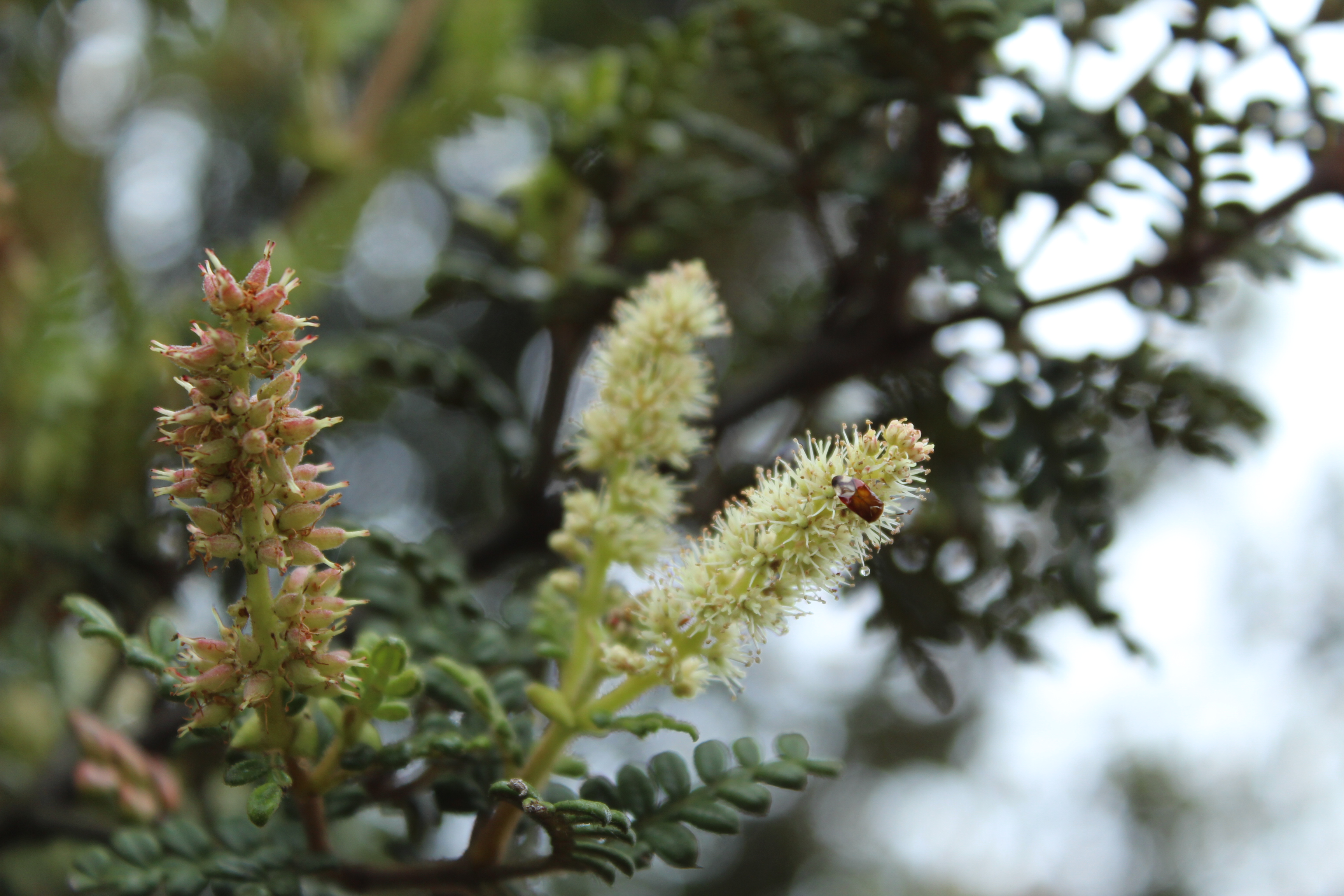 Flores de Weinmannia tomentosa en Paipa, Colombia.